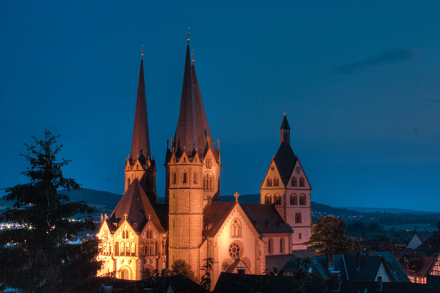 Nachtaufnahme der Marienkirche in Gelnhausen, Hessen (Deutschland)